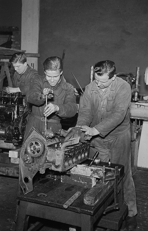 Original image description from the Deutsche Fotothek Kraftfahrzeugschlosser bei der Reparatur eines Motors